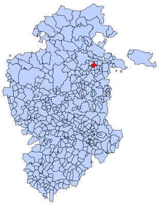 Busto de Bureba en Burgos